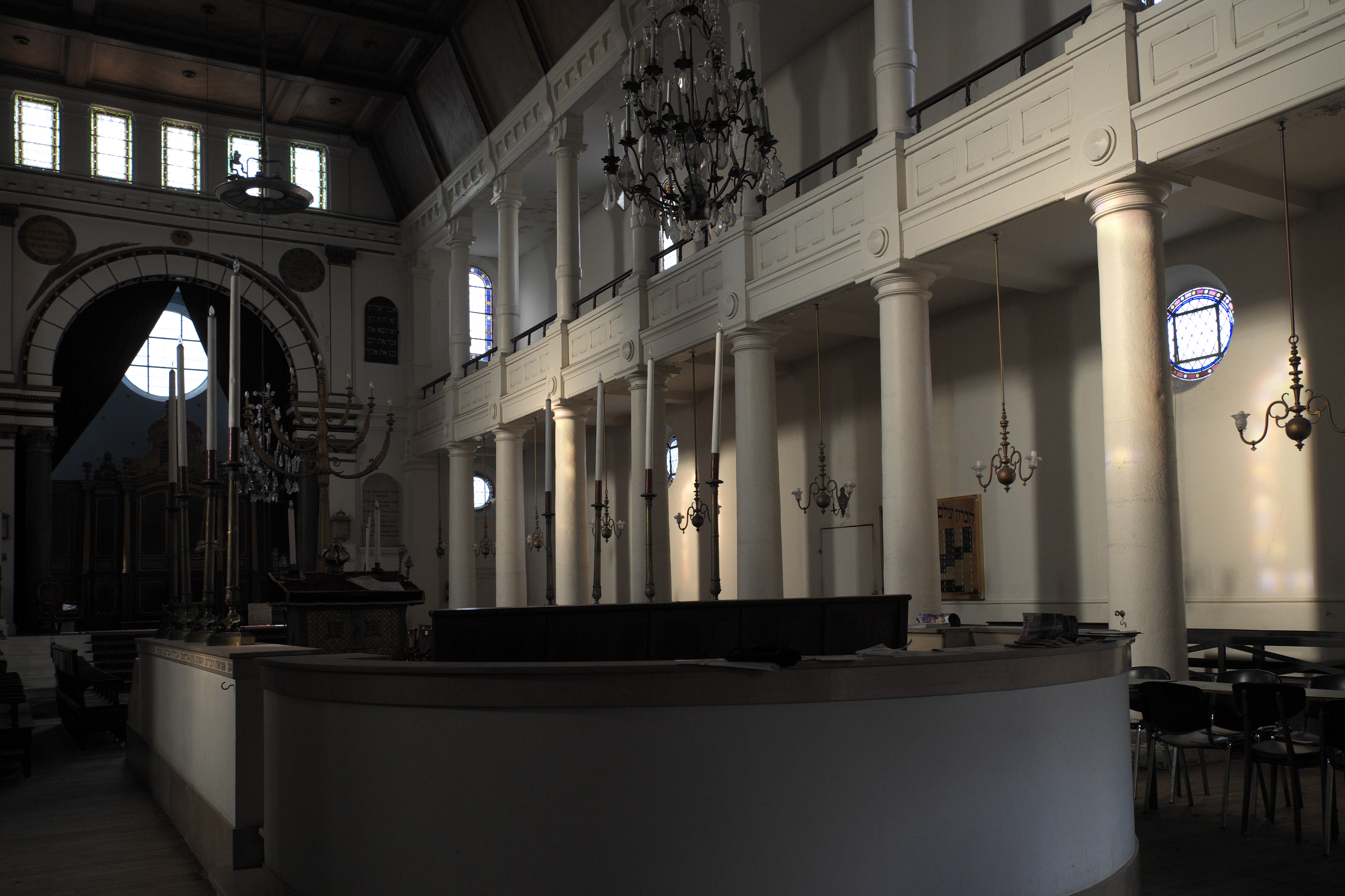 Synagoge in Bayonne im Département Pyrénées-Atlantiques (Region Aquitaine-Limousin-Poitou-Charentes/Frankreich), Innenraum